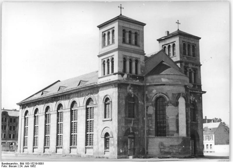 Zentralbild-Biscan 24.6.1952 Die Nicolaikirche in Magdeburg, ein wertvoller Schinkelbau, vor dem Verfall bewahrt. Die Instandsetzungsarbeiten an der 1945, kurz vor Kriegsende, von anglo-amerikanischen Bomben zerstörten Nicolai-Kirche in Magdeburg werden planmäßig fortgesetzt. Nachdem 1951 der zerstörte Turm neu aufgebaut und das Gebäude äusserlich gesichert wurde, gingen Bildhauer, Stukkateure und Maler in diesem Jahr daran, das Innere der Kirche zu erneuern. Sie sind dabei bestrebt, den unter Denkmalschutz stehenden Bau ganz im Stile Karl Schinkels, des Erbauers der Kirche, wieder herzustellen und tragen so dazu bei, wertvolles deutsches Kulturgut zu erhalten.- UBz: Die Nicolai-Kirche in Magdeburg, die mit namhaften Zuschüssen aus öffentlichen Mitteln instandgesetzt wird und vielleicht 1953 schon wieder ihrer Bestimmung übergeben werden kann. Das Gebäude ist äusserlich bereits fertig restauriert; die Arbeiten im Innern der Kirche werden noch längere Zeit beanspruchen.